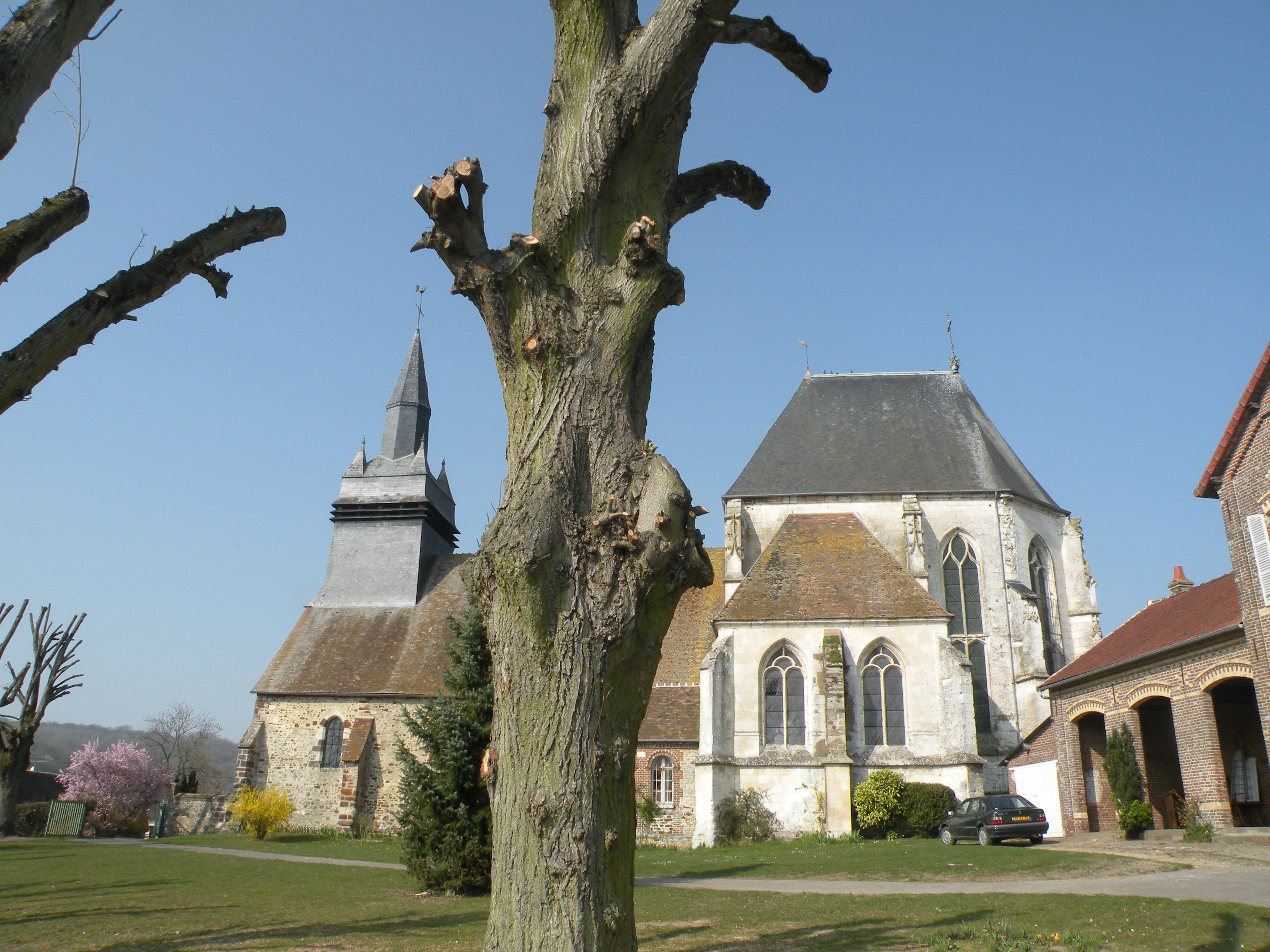 Église Saint-Denis d'Hodenc-en-Bray